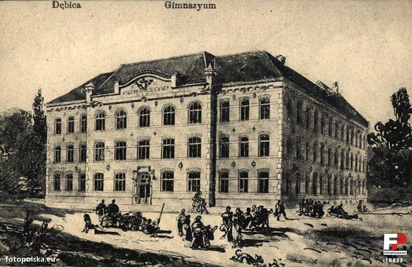 szkoła w Dębicy przed II wojną światową